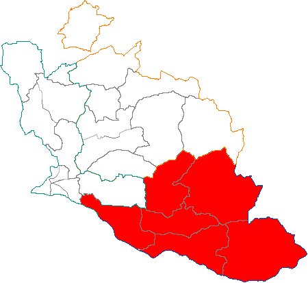 L'arrondissement d'Apt (Vaucluse)